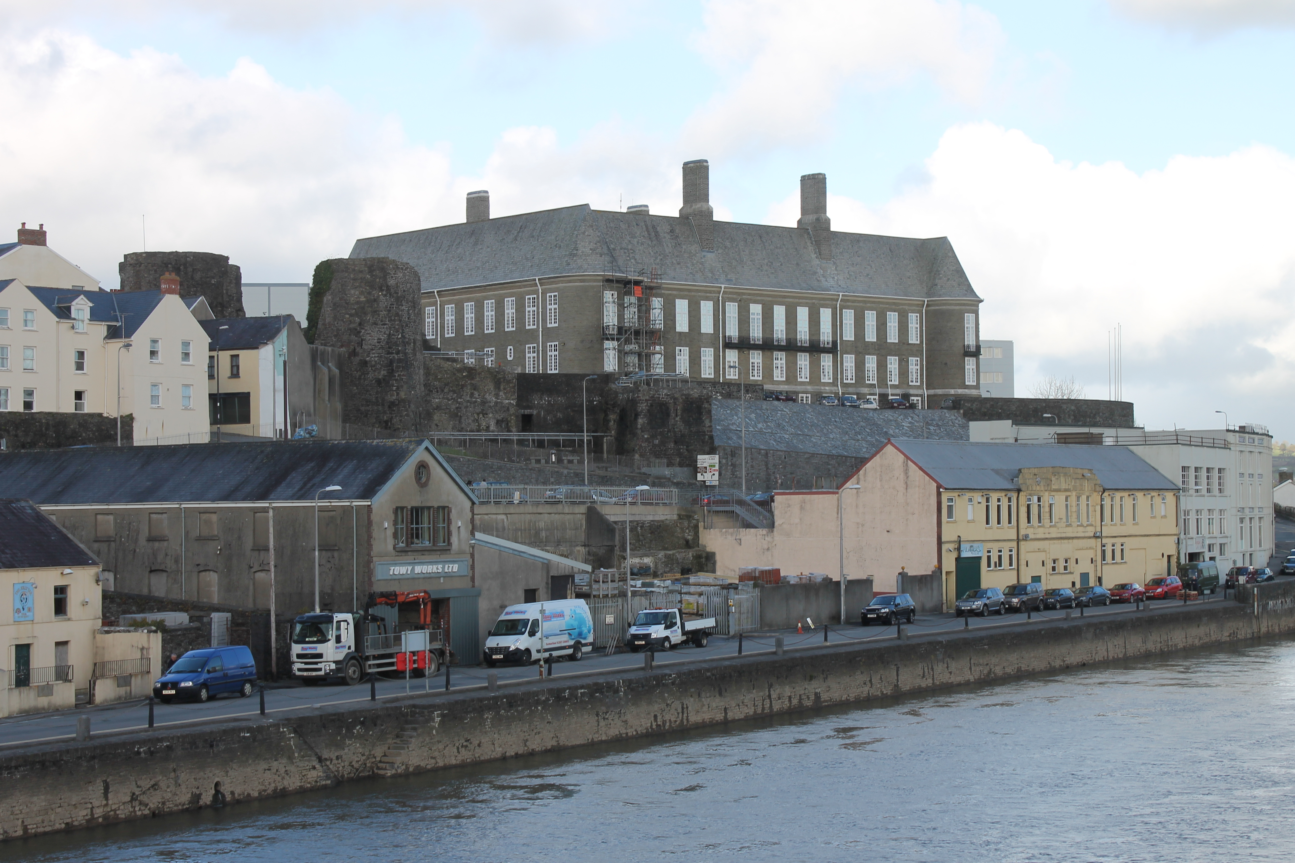 Neuadd y Sir, tref Caerfyrddin, De Cymru.